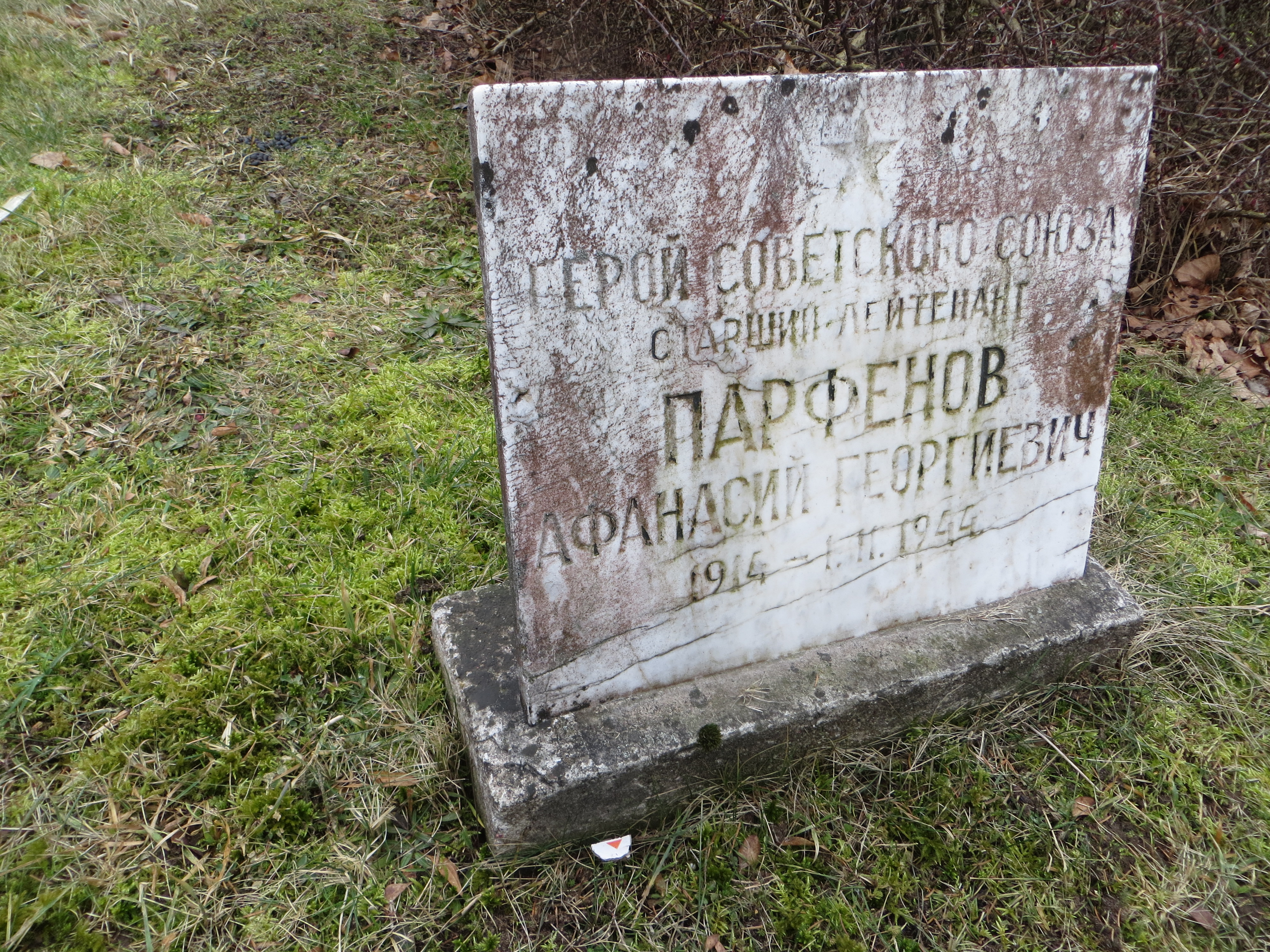 Мемориальная плита на месте захоронения Героя Советского Союза Парфенова А.Г. на воинском братском кладбище в Вайнёде, февраль 2014г.